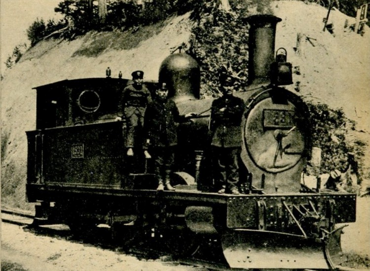 川上線での1530形。出典に撮影場所・日時・状況は記されていない。